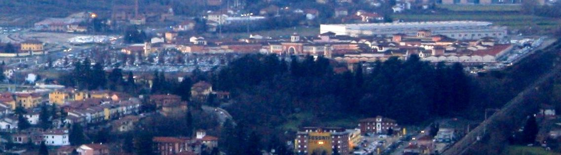 L'Outlet di Serravalle Scrivia visto da Monte Spineto.